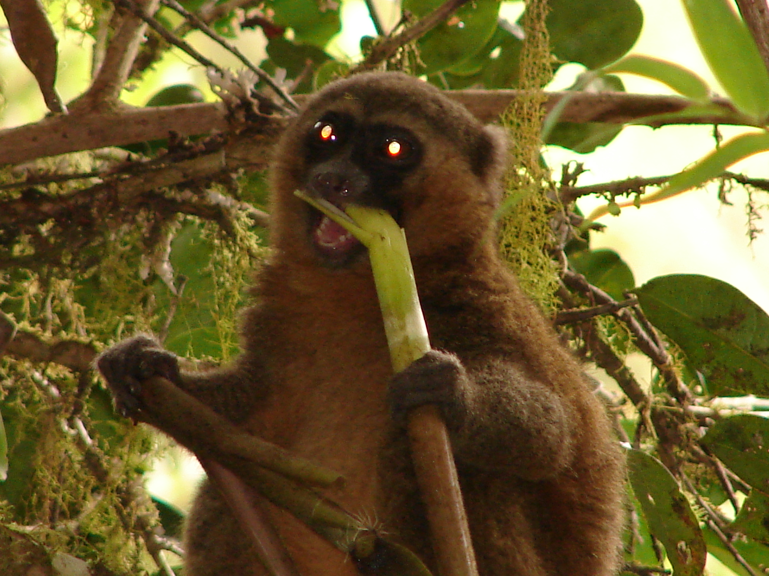 Hapalemur aureus Golden Bamboo Lemur, Ranomafana National Park